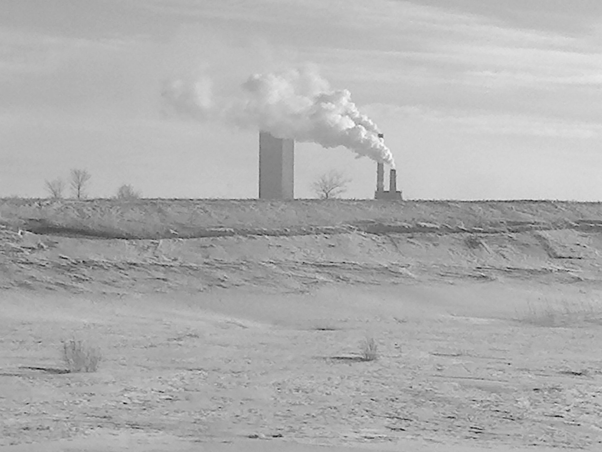 Трубы Карагандинской ТЭЦ-1. Слева виден копер шахты имени 50-летия Октябрьской революции (шахта № 22)